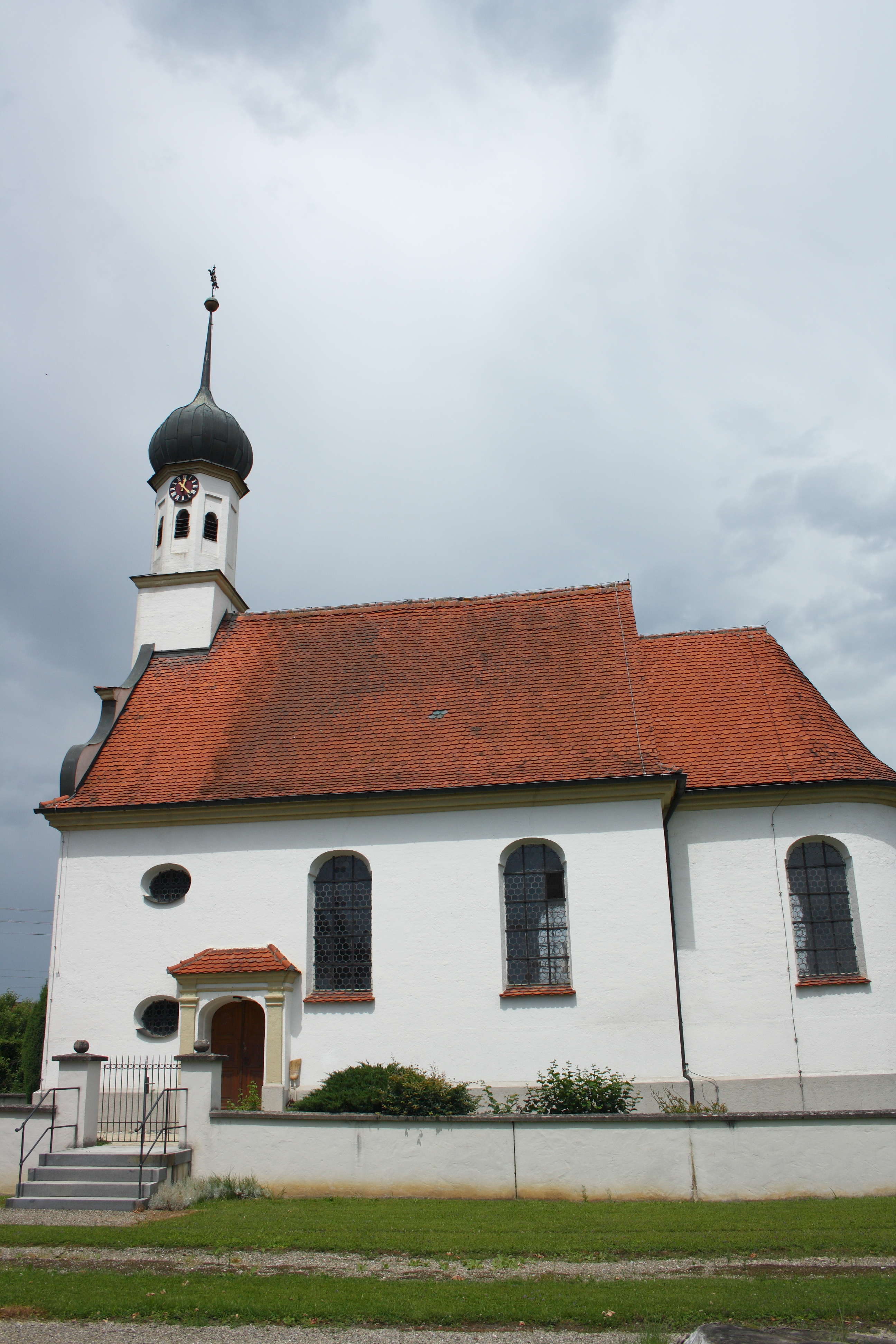 Katholische Kirche St. Oswald in Glöttweng, einem Ortsteil von Landensberg im Landkreis Günzburg (Bayern)